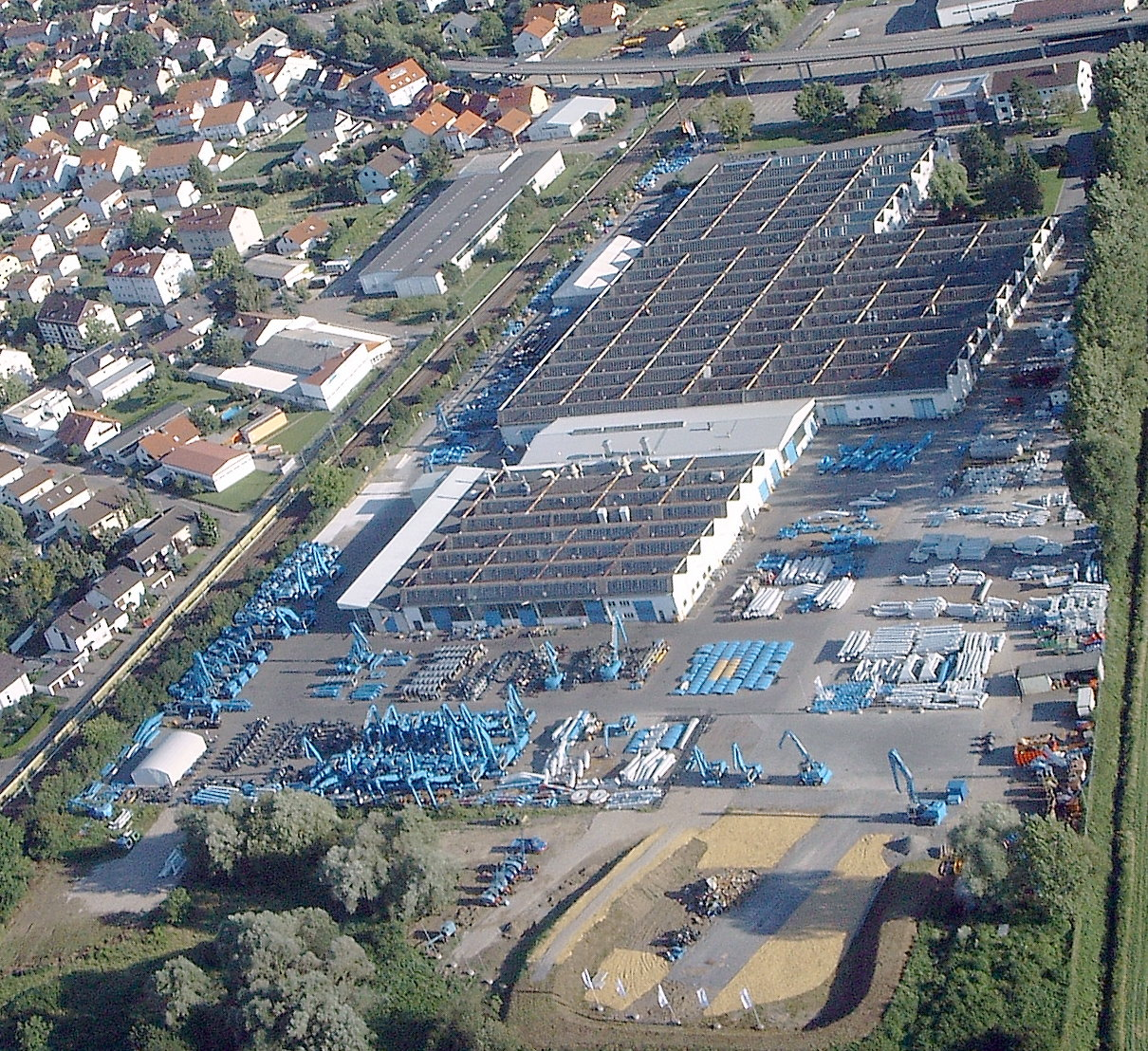 Luftbild von Terrex/Fuchs in Bad Schhönborn